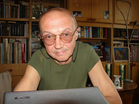 Серге́й Бори́сович Ильи́н — русский переводчик англоязычной прозы. Автопортрет.